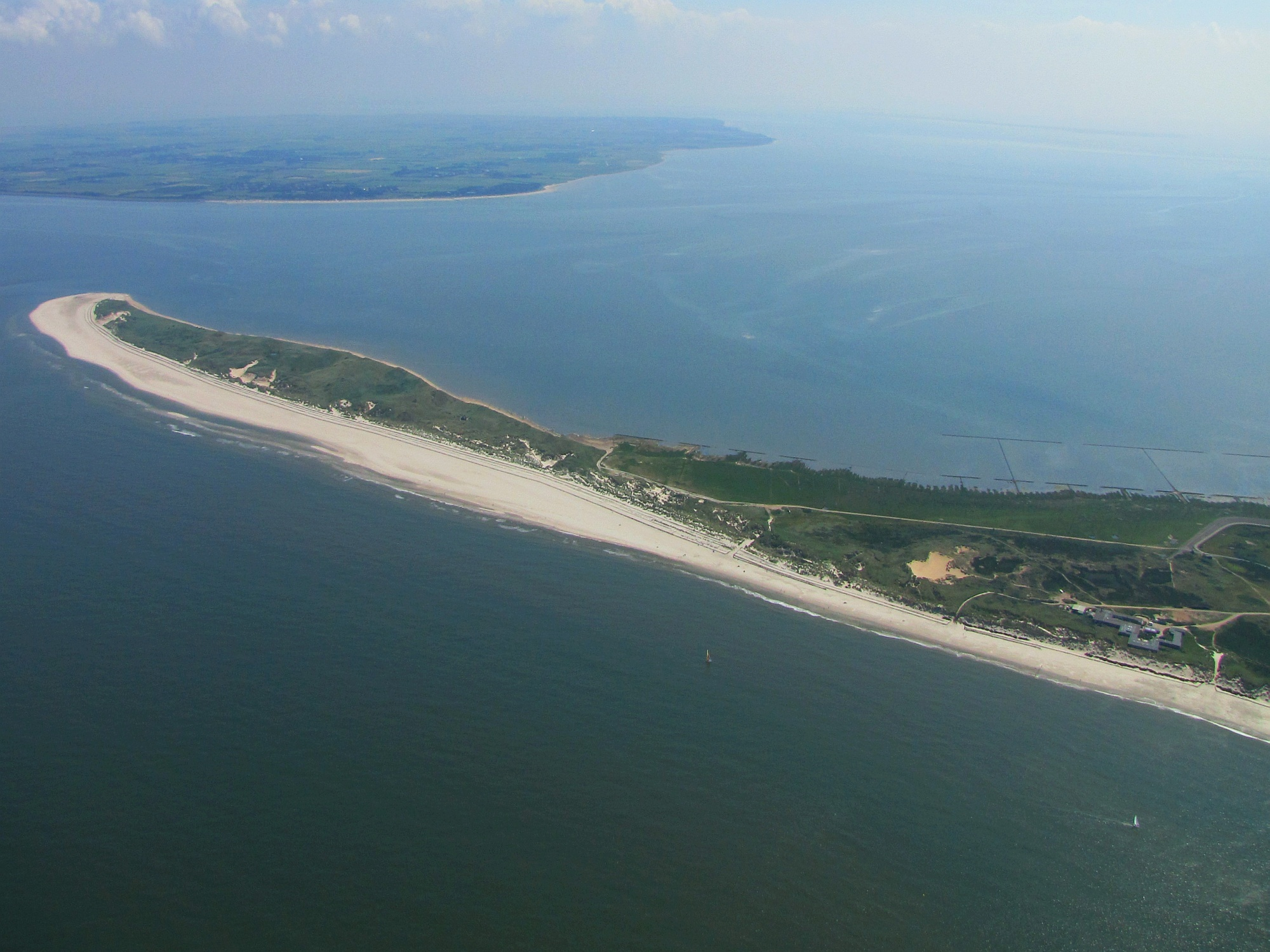 Der Nordosten der Insel Amrum: das Naturschutzgebiet Odde, Ansicht von Nord - Amrum ist eine Nordsee-Insel im Kreis Nordfriesland - Foto Wolfgang Pehlemann IMG_1105